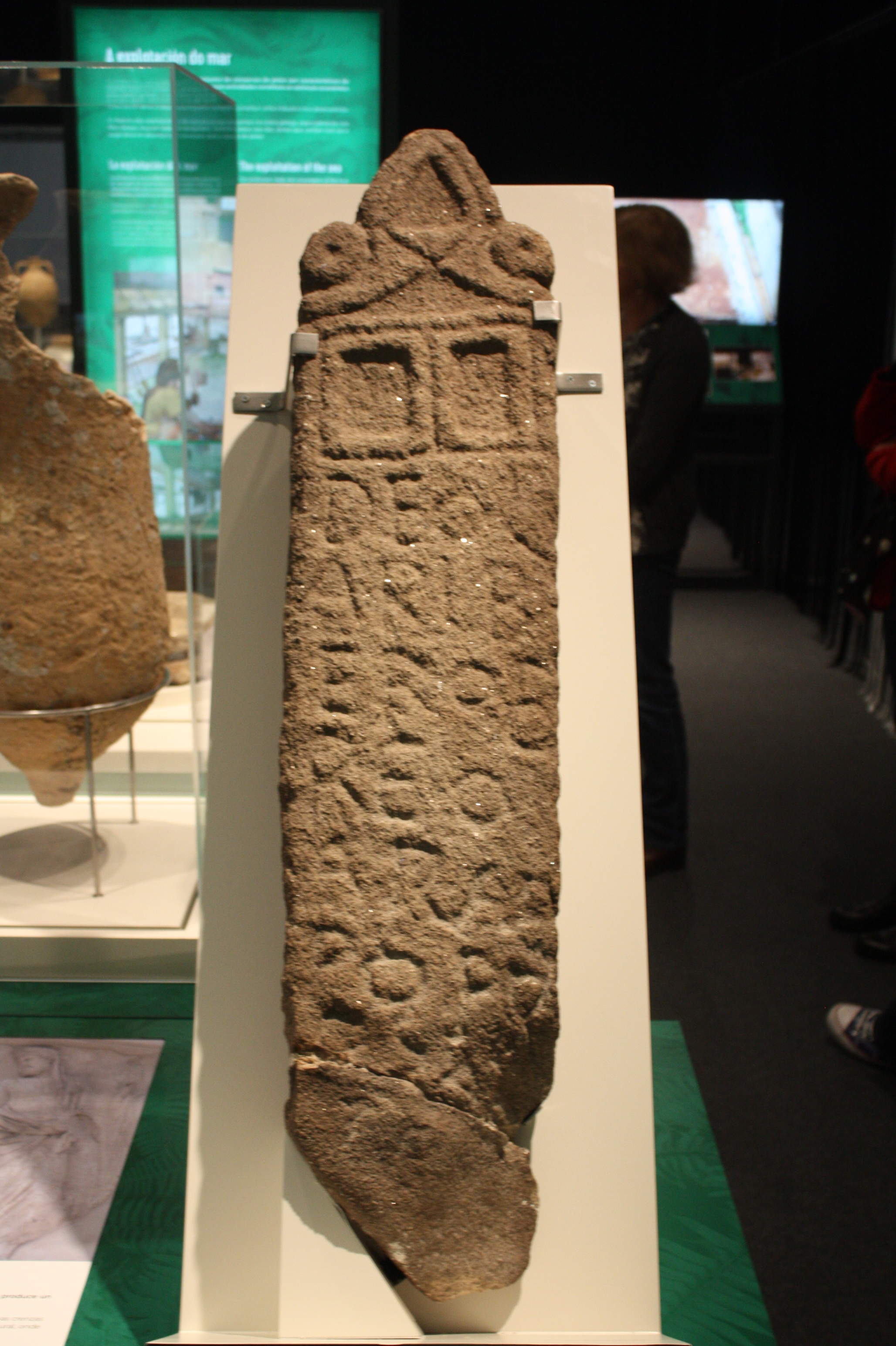 Unha das aras votivas ó deus lar Berobreo (século IV dC), atopadas no santuario de Monte do Facho, en Cangas (Pontevedra)